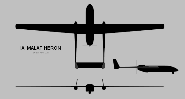 IAI HERON Drawing